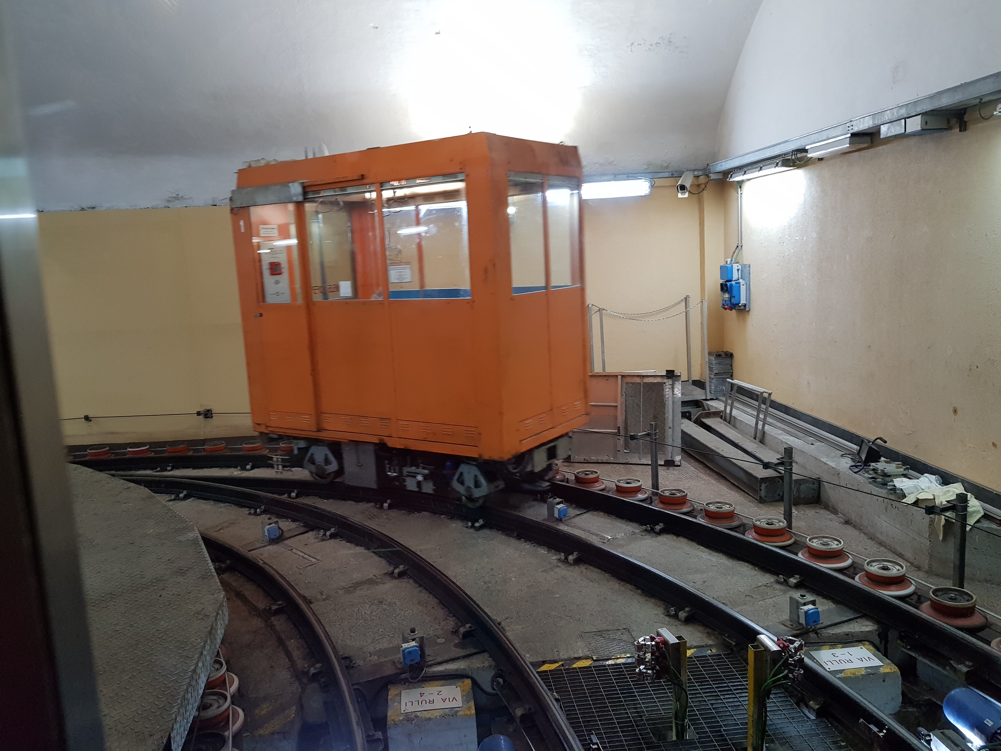 Ascensore Castello d'Albertis-Montegalletto a Genova